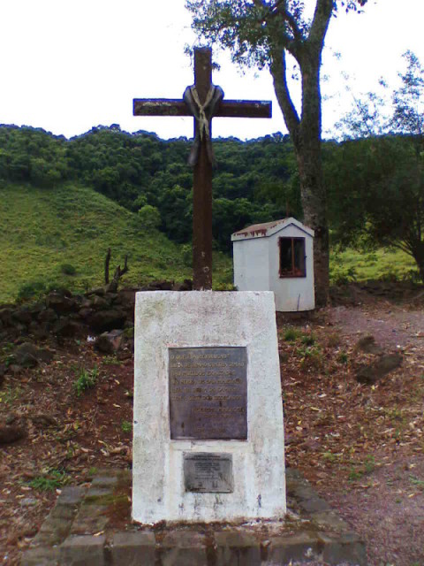 Cruz dos Degolados, homenagem do município de São Martinho do Sul, RS (Brasil) aos mortos na revolução entre Maragatos e Chimangos.